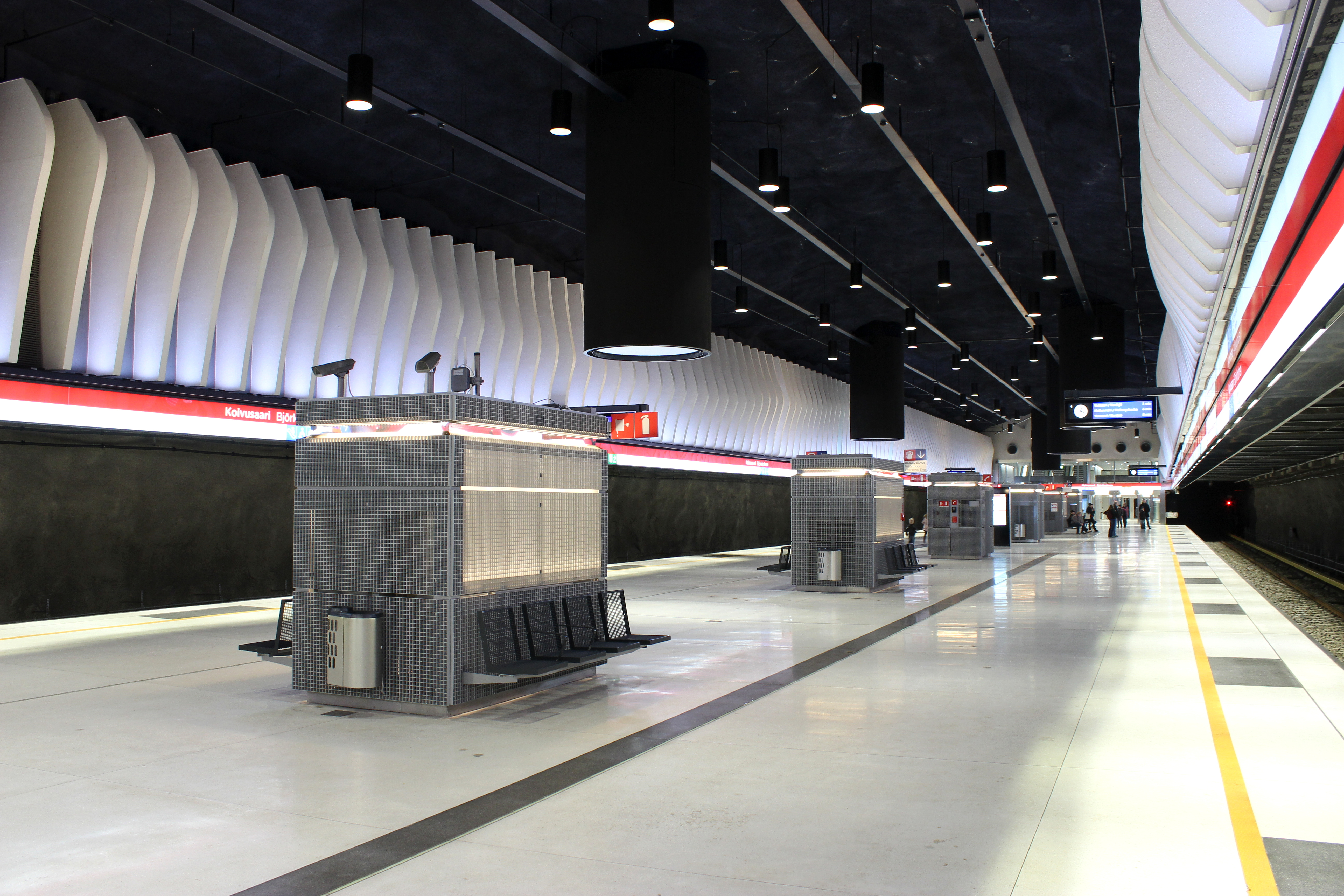 Koivusaaren metroasema marraskuussa 2017.